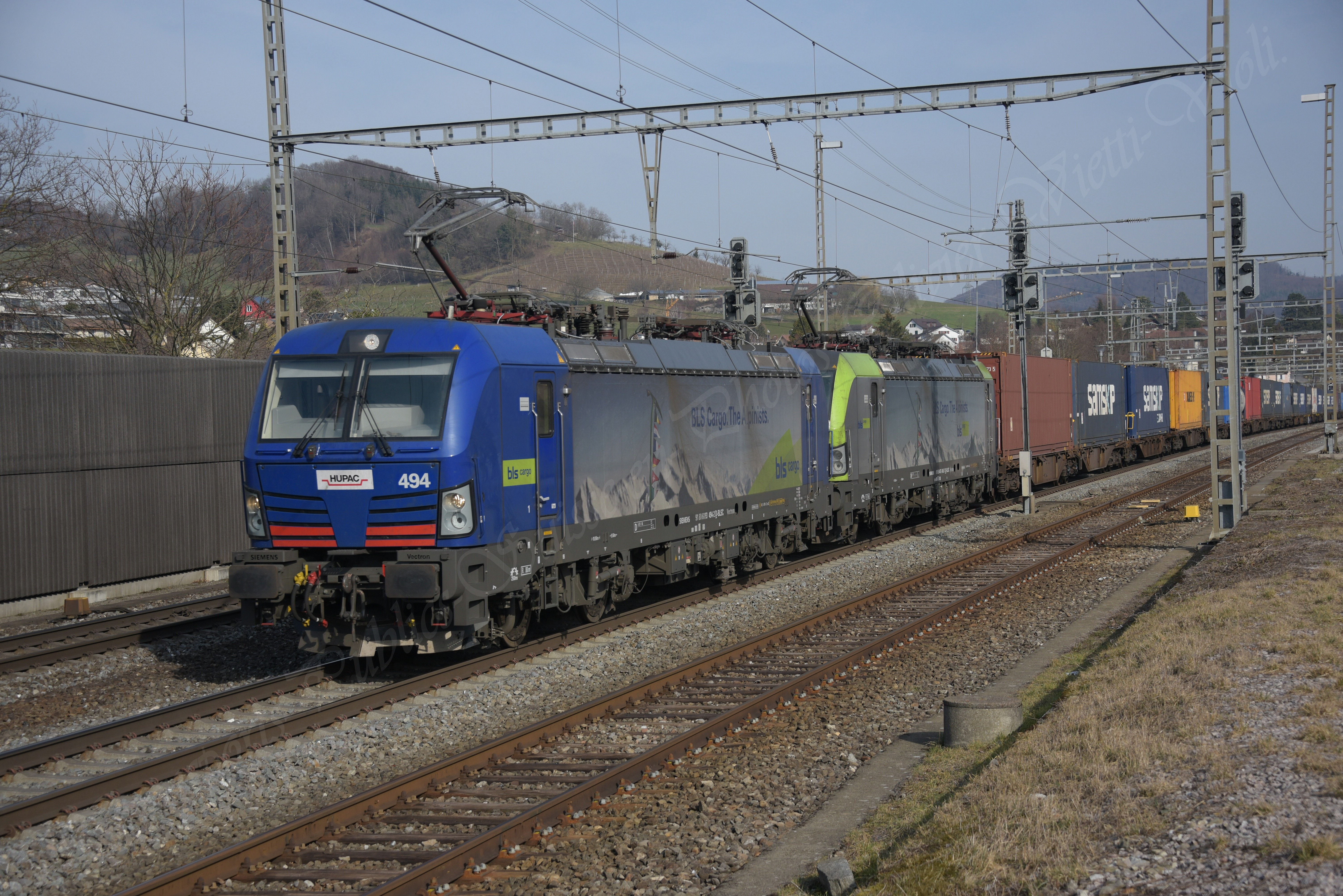 Br 193 494 en UM Ici à Gelterkinden. © 2019 {Olivier Vietti-Violi}